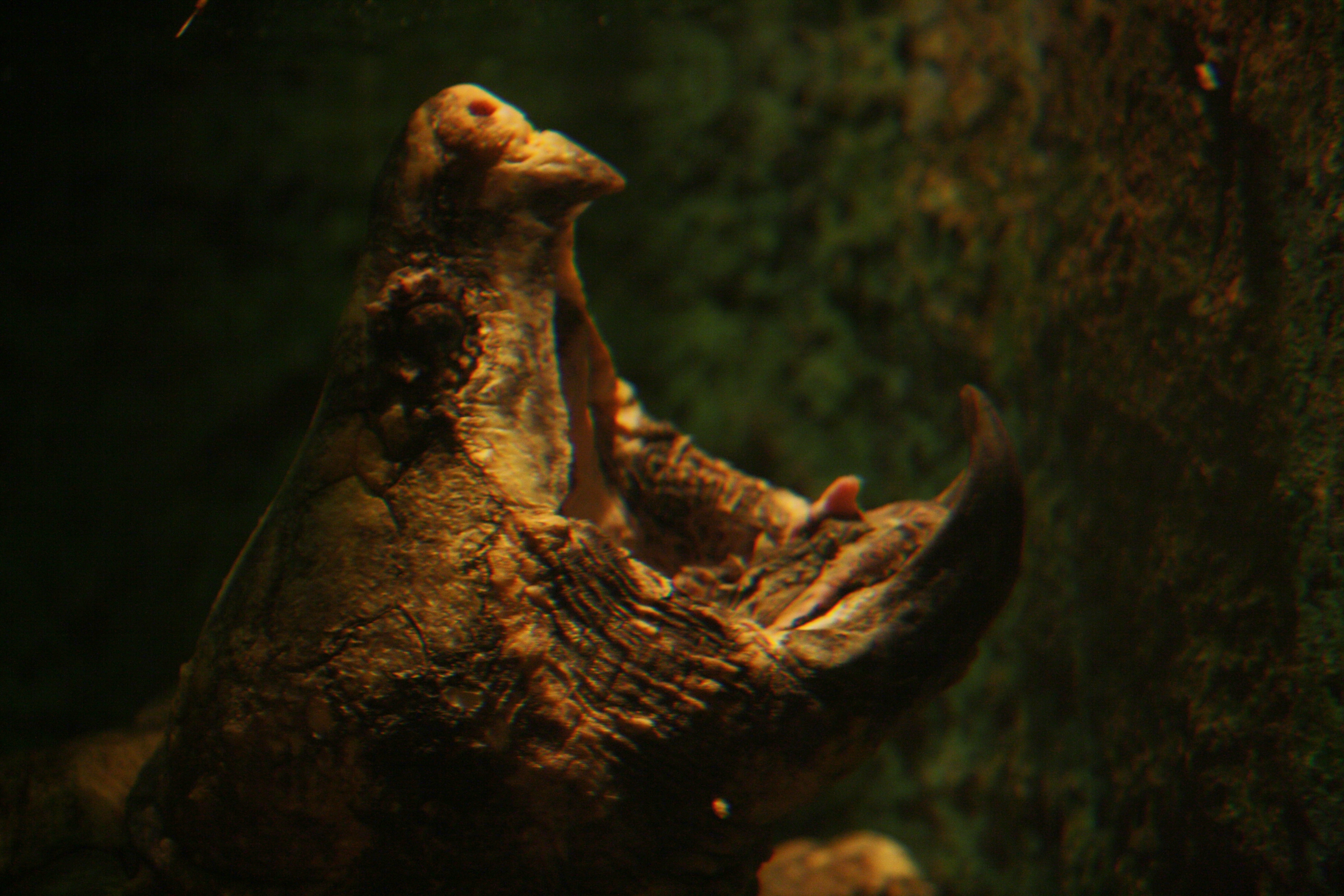 Zoo Praha